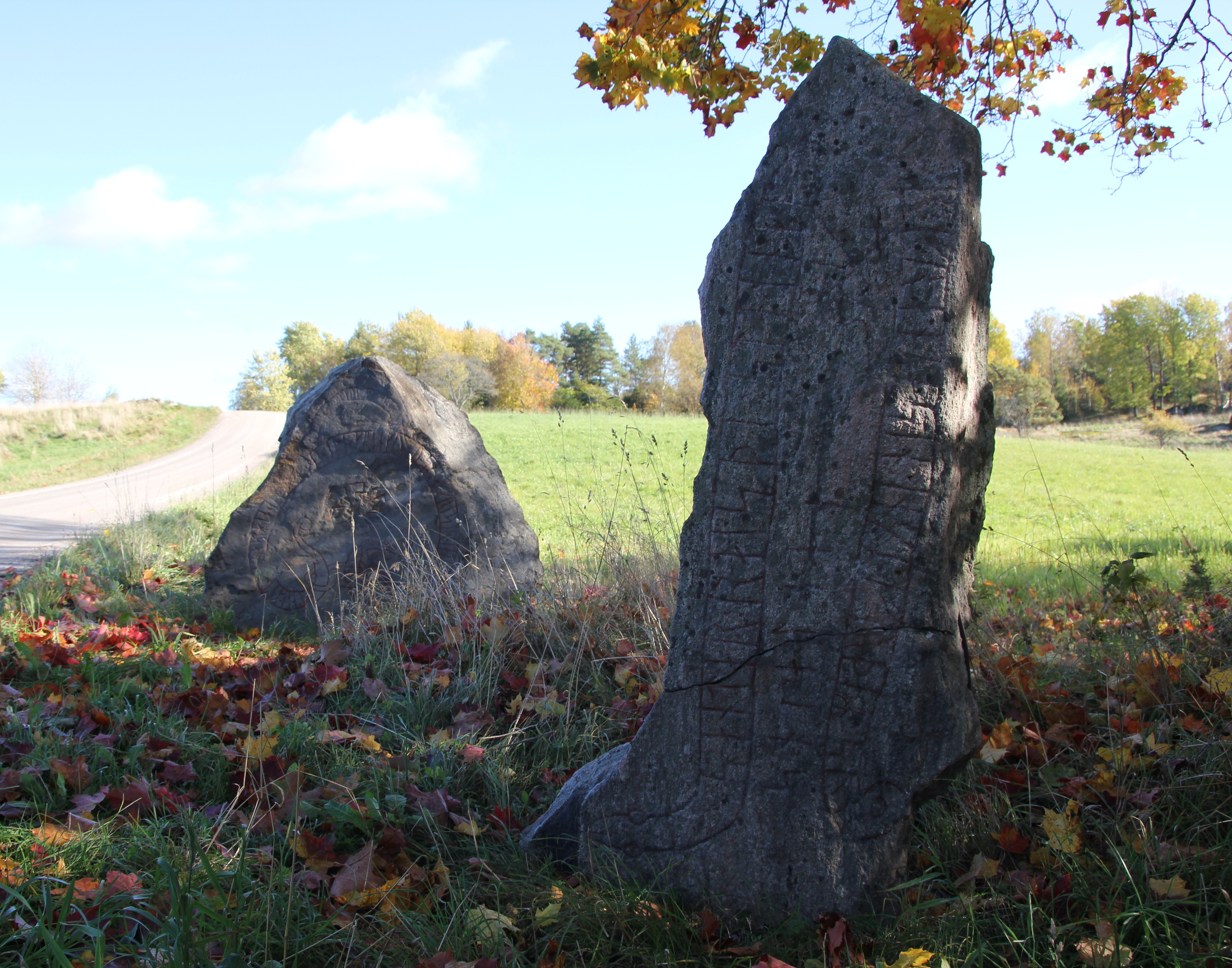 Runstenarna Sö 139 (borterst) och Sö 140 (närmast) vid Korpbron i Ludgo socken, Nyköping.